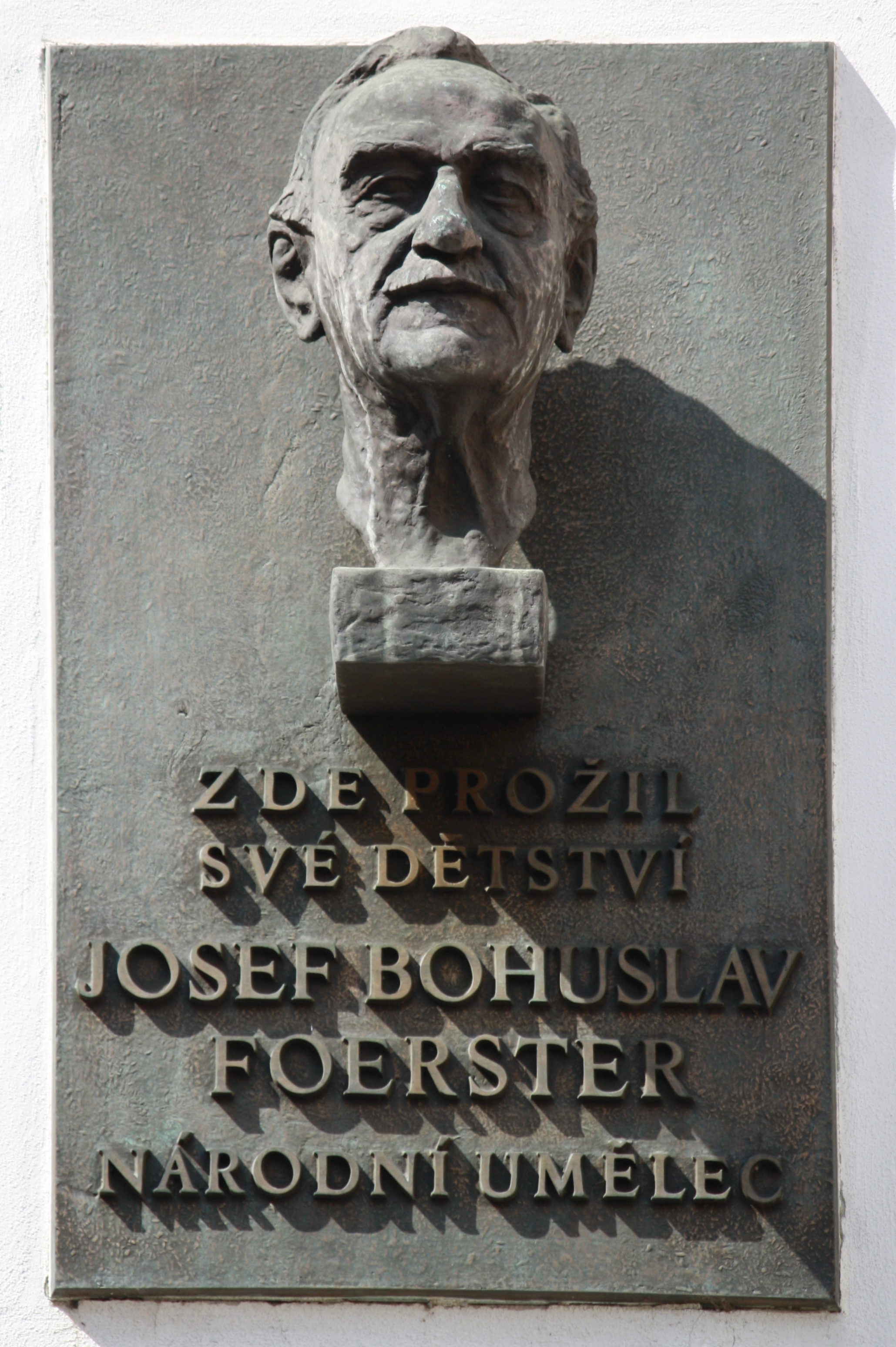 Josef Bohuslav Foerster - Pamětní deska s bustou na domě U Hrubšů